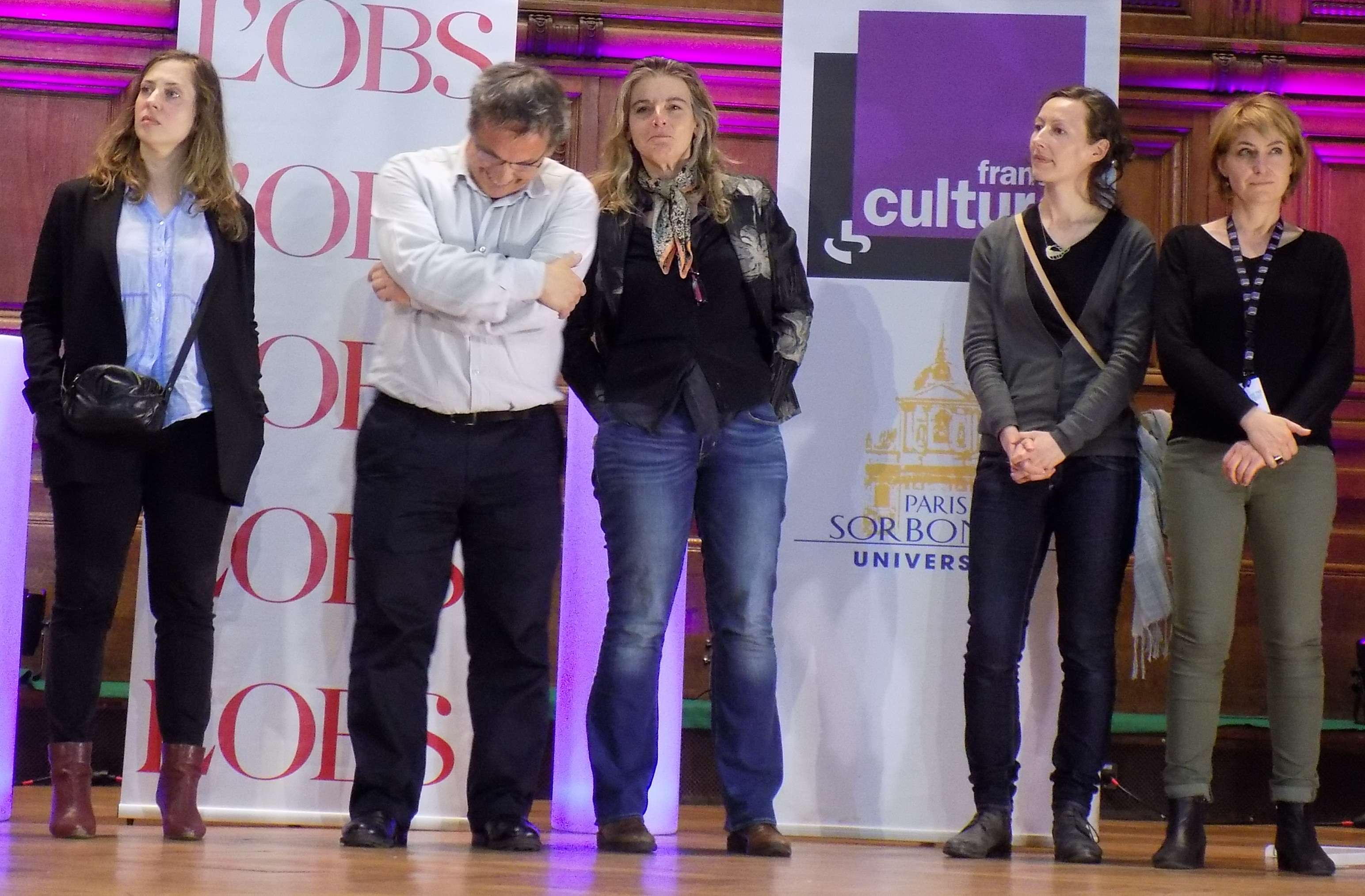 Équipe La Fabrique de l'histoire lors du forum « L’année vue par l’histoire » organisé par France Culture le 25 avril 2015